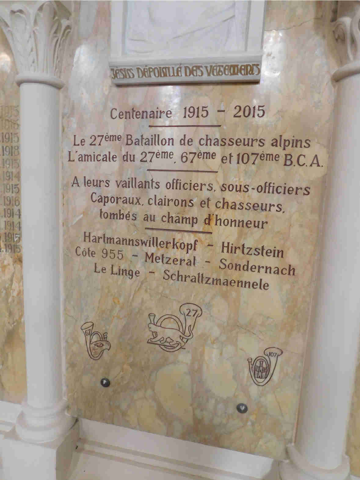 Plaque du 27eme BCA a l'Emme, Metzeral (68)